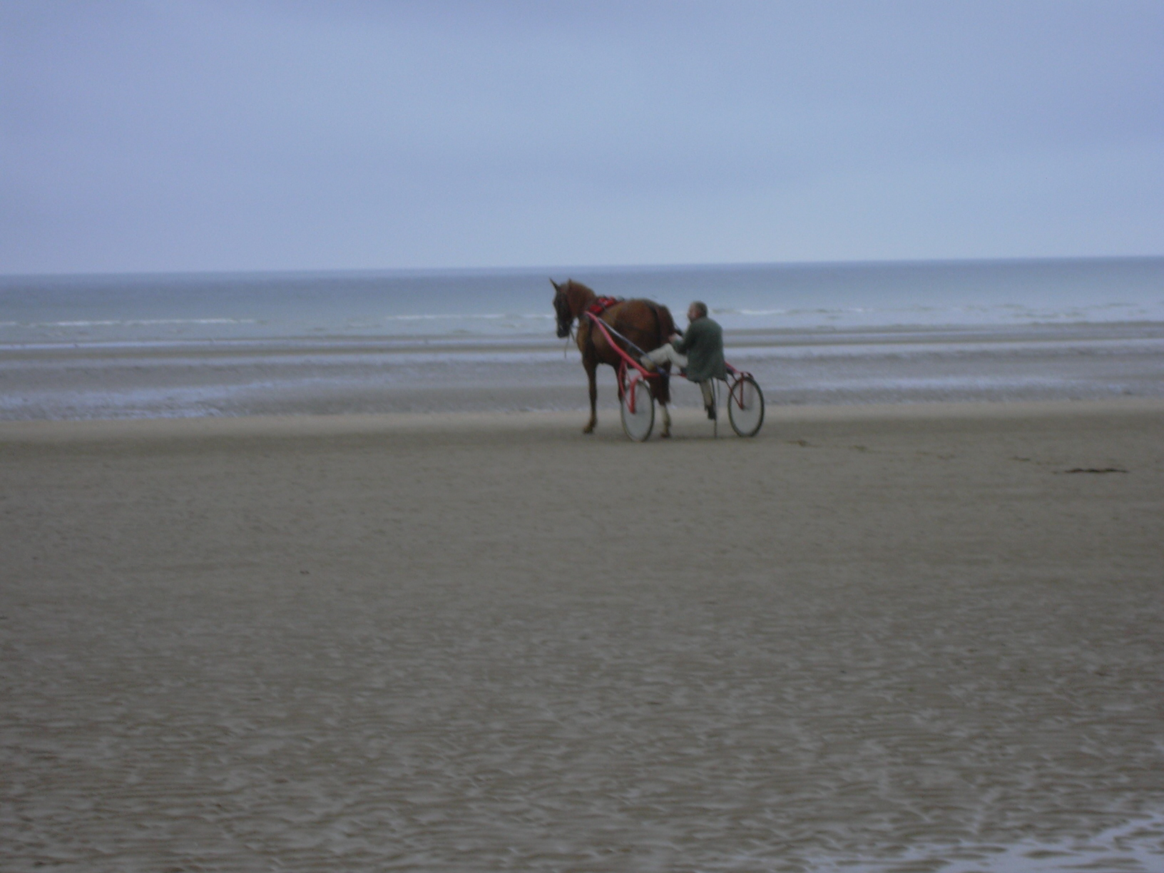 entrainement d'un trotteur le matin sur la plage de Cabourg